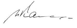 Автограф Ислама Каримова